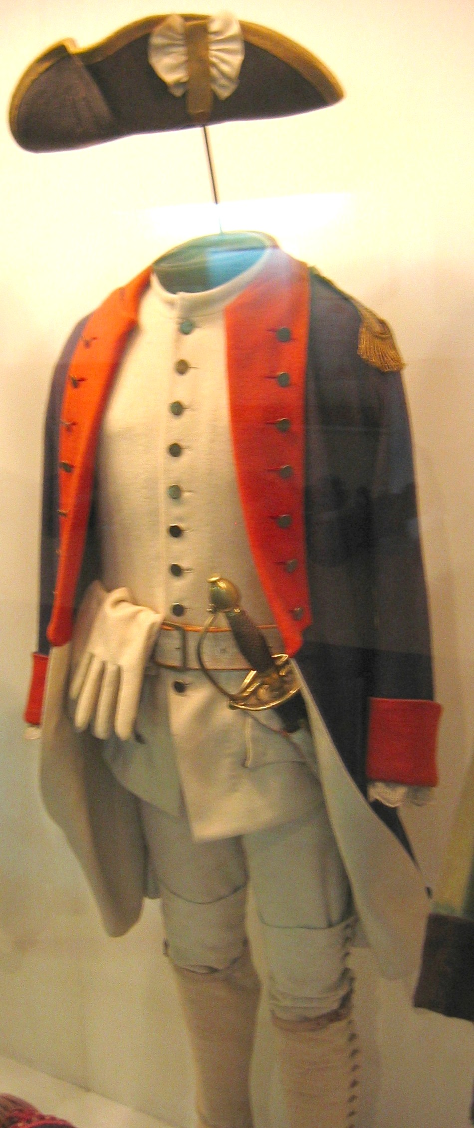 Polish Szkoła Rycerska cadet uniform author User:Mathiasrex Maciej Szczepańczyk